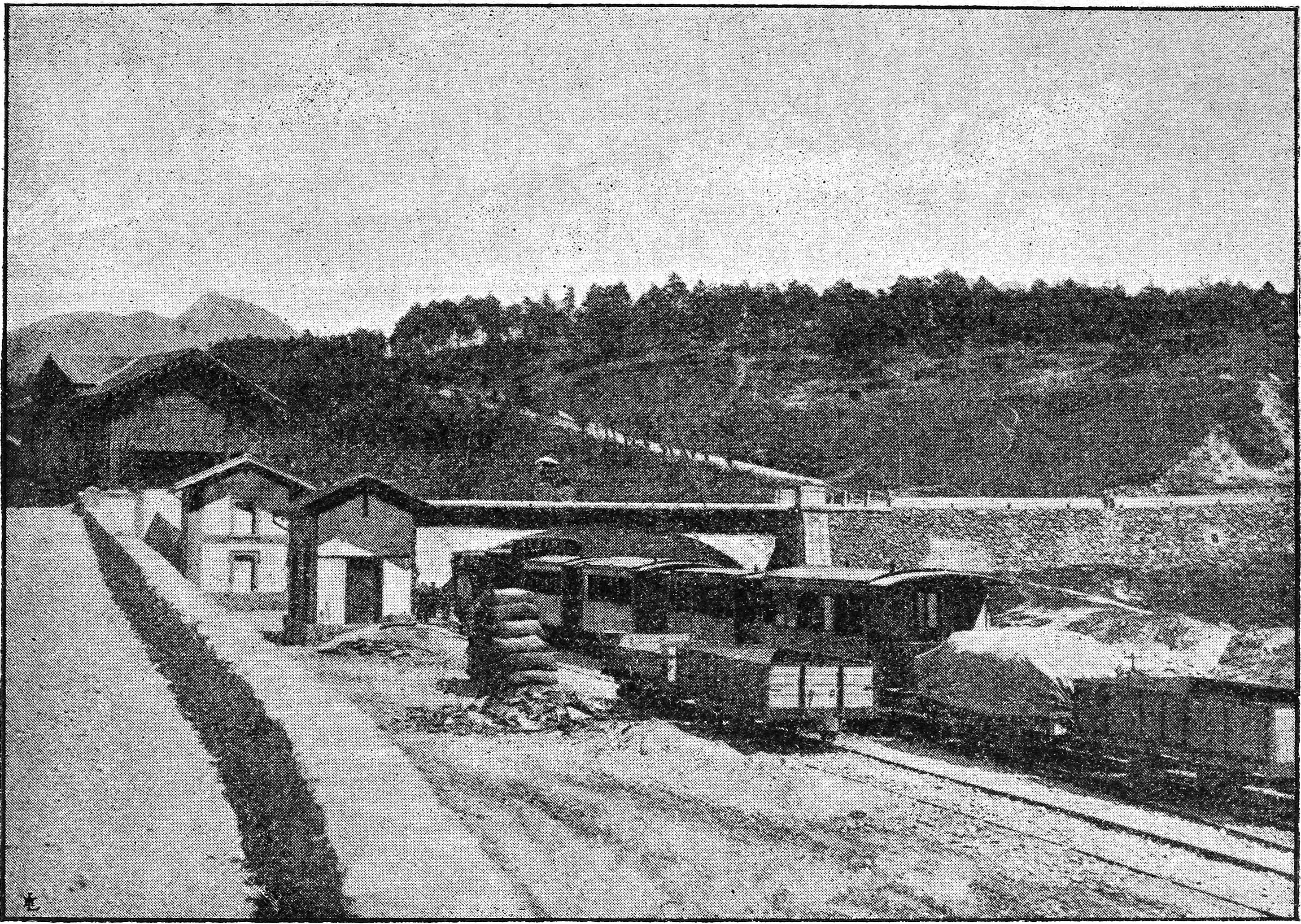 Immagine dal libro La Valle Seriana, Antonio Vallardi, Milano, 1900 - Ponte selva